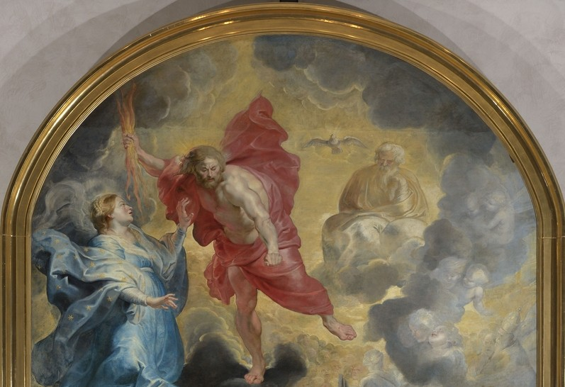 Peinture